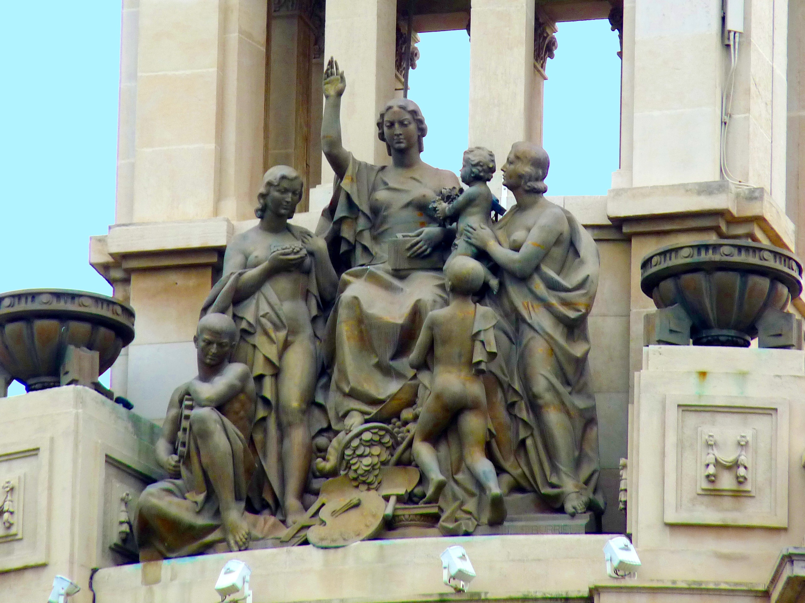 Zaragoza - Esquina de Gran Via con Paseo Sagasta - Alegoría del Ahorro (1945) por Félix Burriel [1]